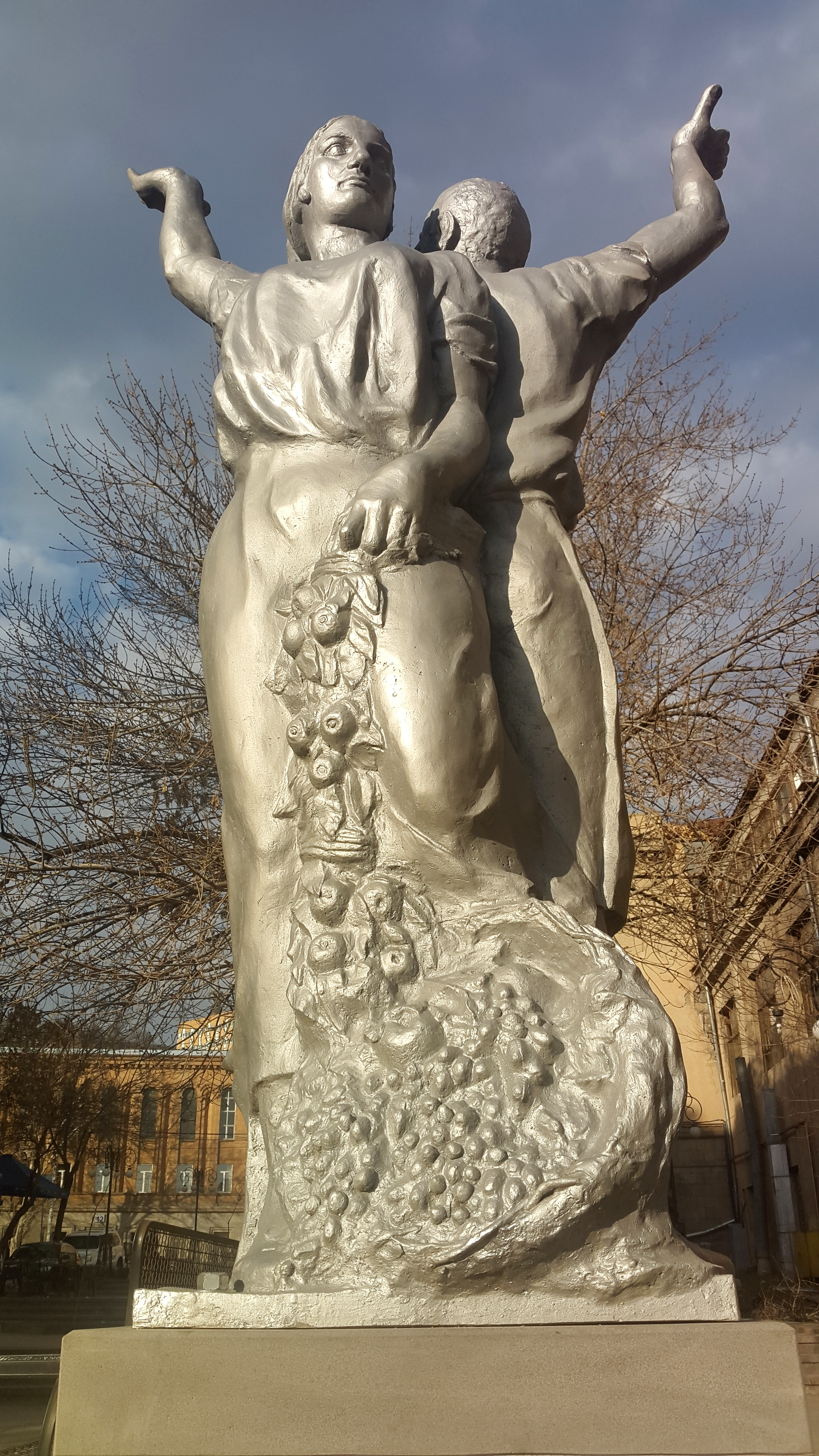 Ձոն միաբանության արձանը Մոսկովյան պուրակում